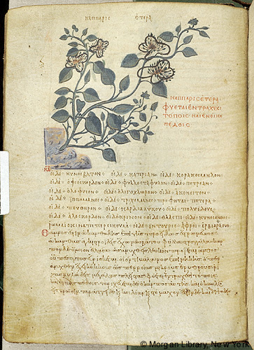 caper: Pierpont Morgan Dioscorides f. 81v